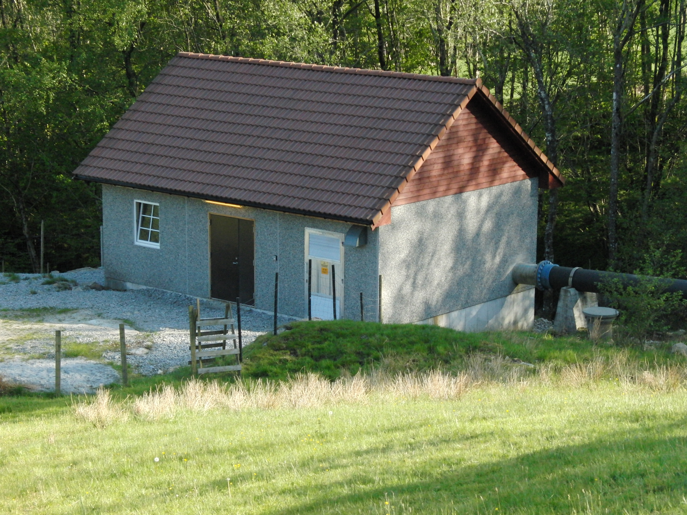 Bjelland II kraftverk